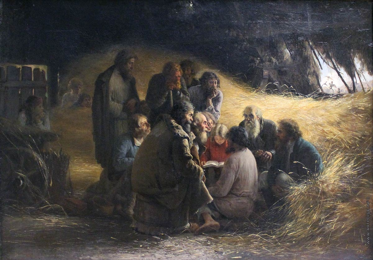 Чтение Положения 1861 года Год создания 1881 Материал Холст, масло Собрание Национальный художественный музей Республики Беларусь